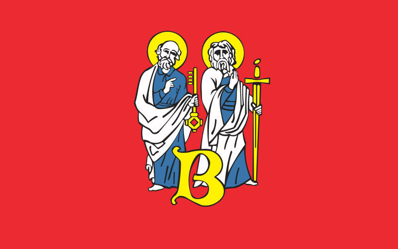 Flaga "proporzec" Biecza (miasto w Województwie Małopolskim).